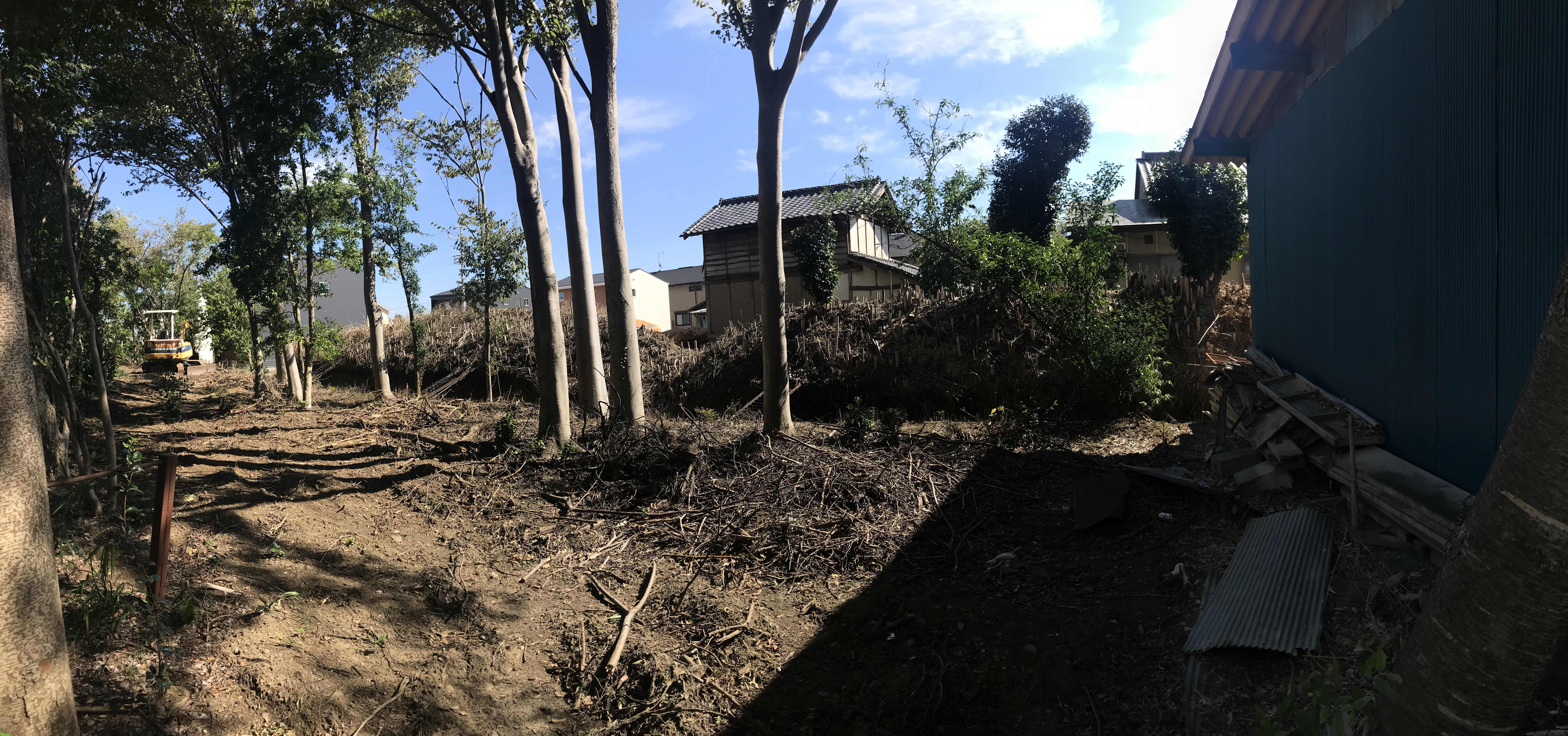 ２０１８年竹林伐採の際に露呈した川連城北側の土塁